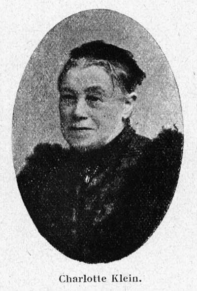 Fotografi af Charlotte Klein i tidsskriftet "Kvinden og Samfundet", nr. 13, 1913.